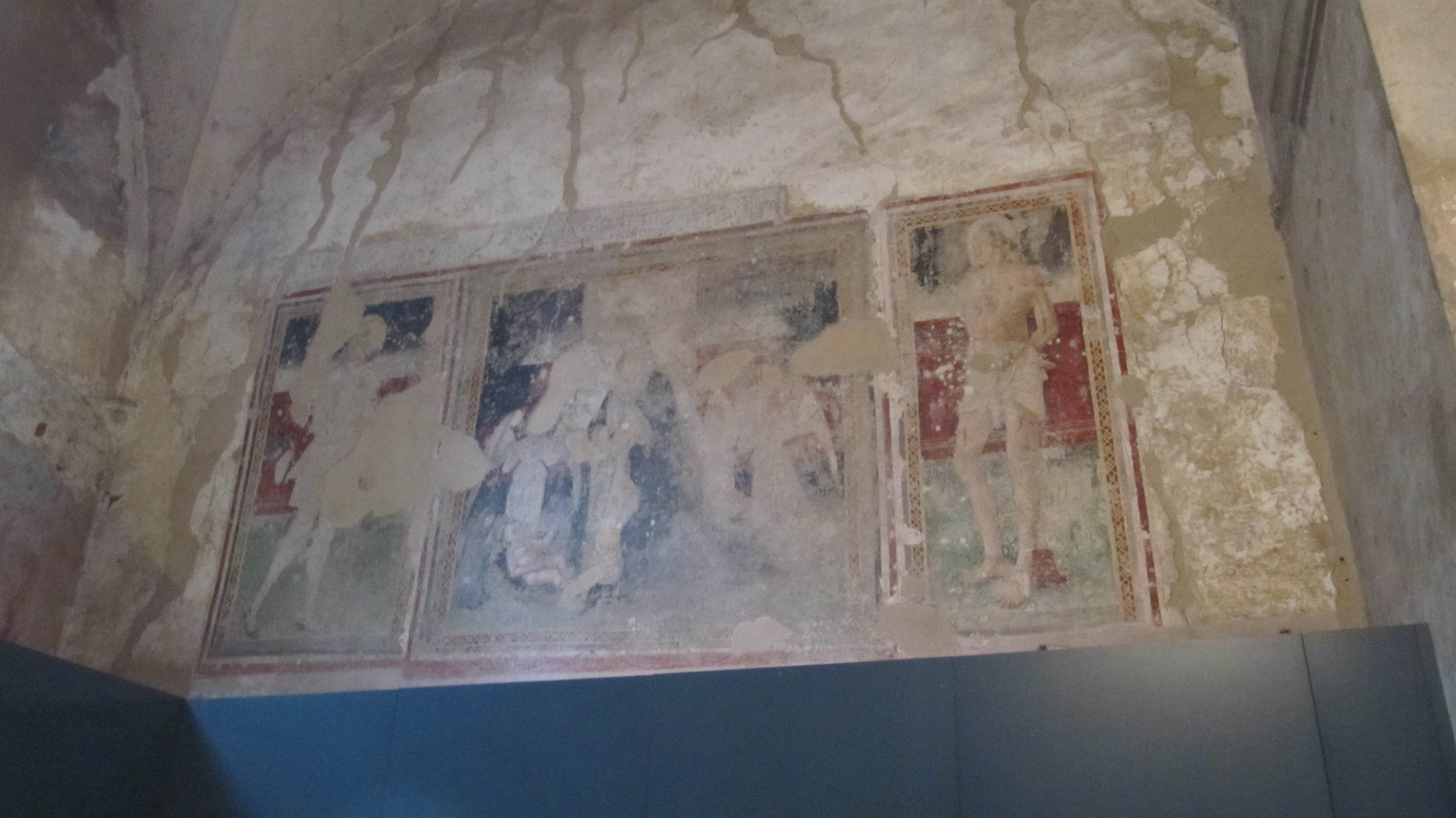 storie di san giovanni battista (san salvatore, brescia, maestro milanese del XIV secolo)